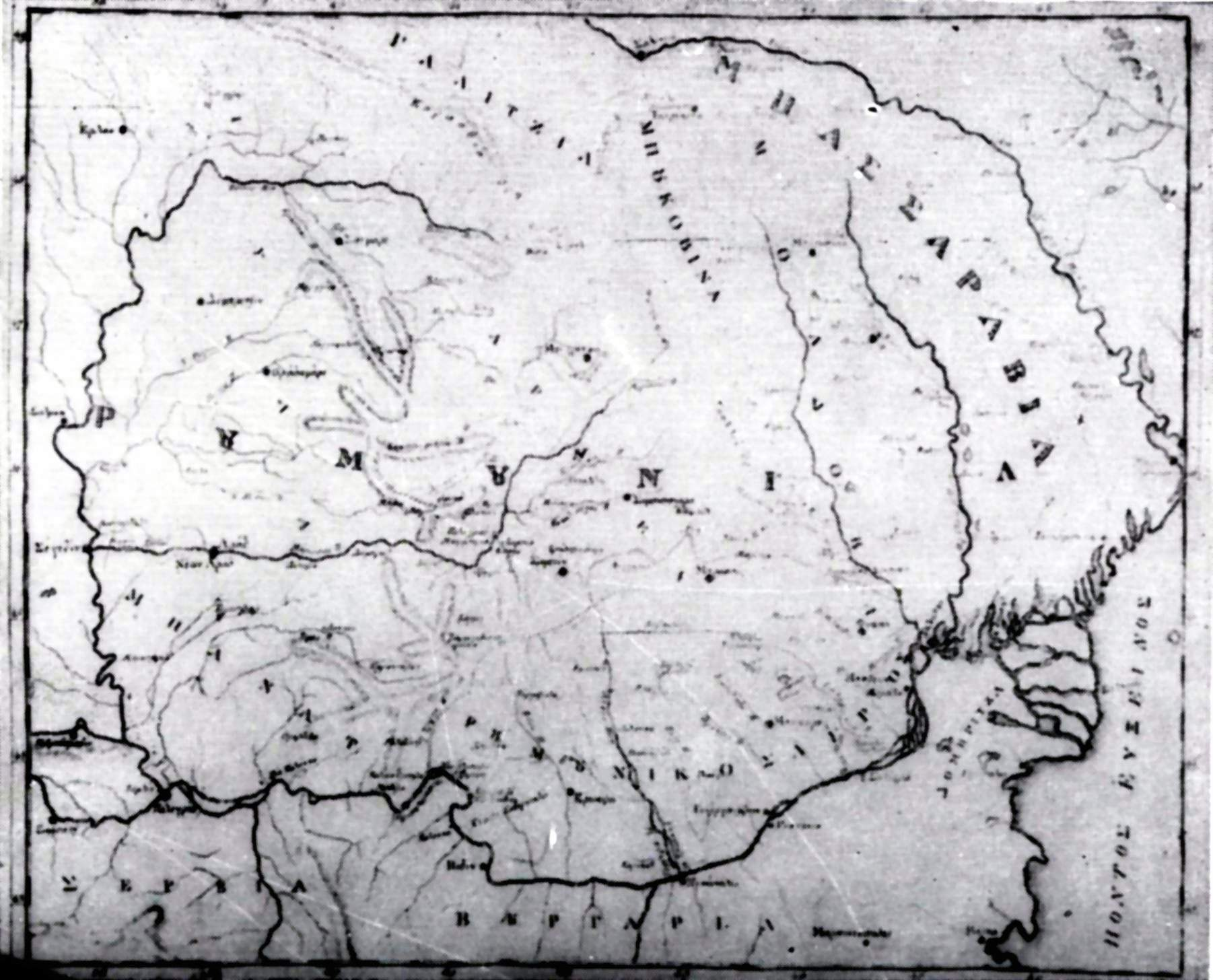 Este ce mai veche harta cunoscută în care apare denumirea "România" (în limba greacă: Rumunia)